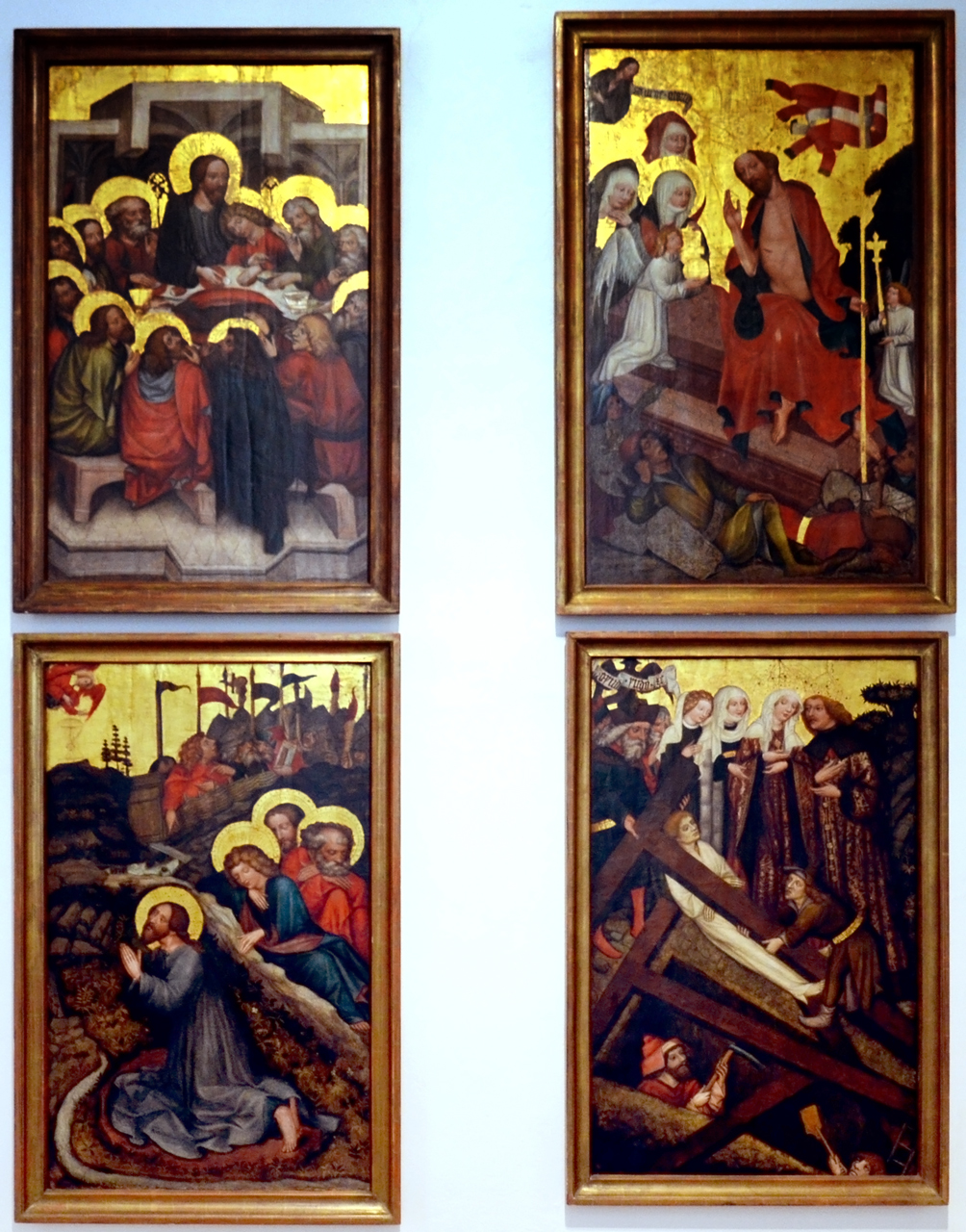 Rajhradský oltář, (Poslední večeře, Kristus na hoře Olivetské , Zmrtvýchvstání Krista, Nalezení a zkoušení pravého sv. Kříže sv. Helenou a Konstantinem), Moravská galerie v Brně